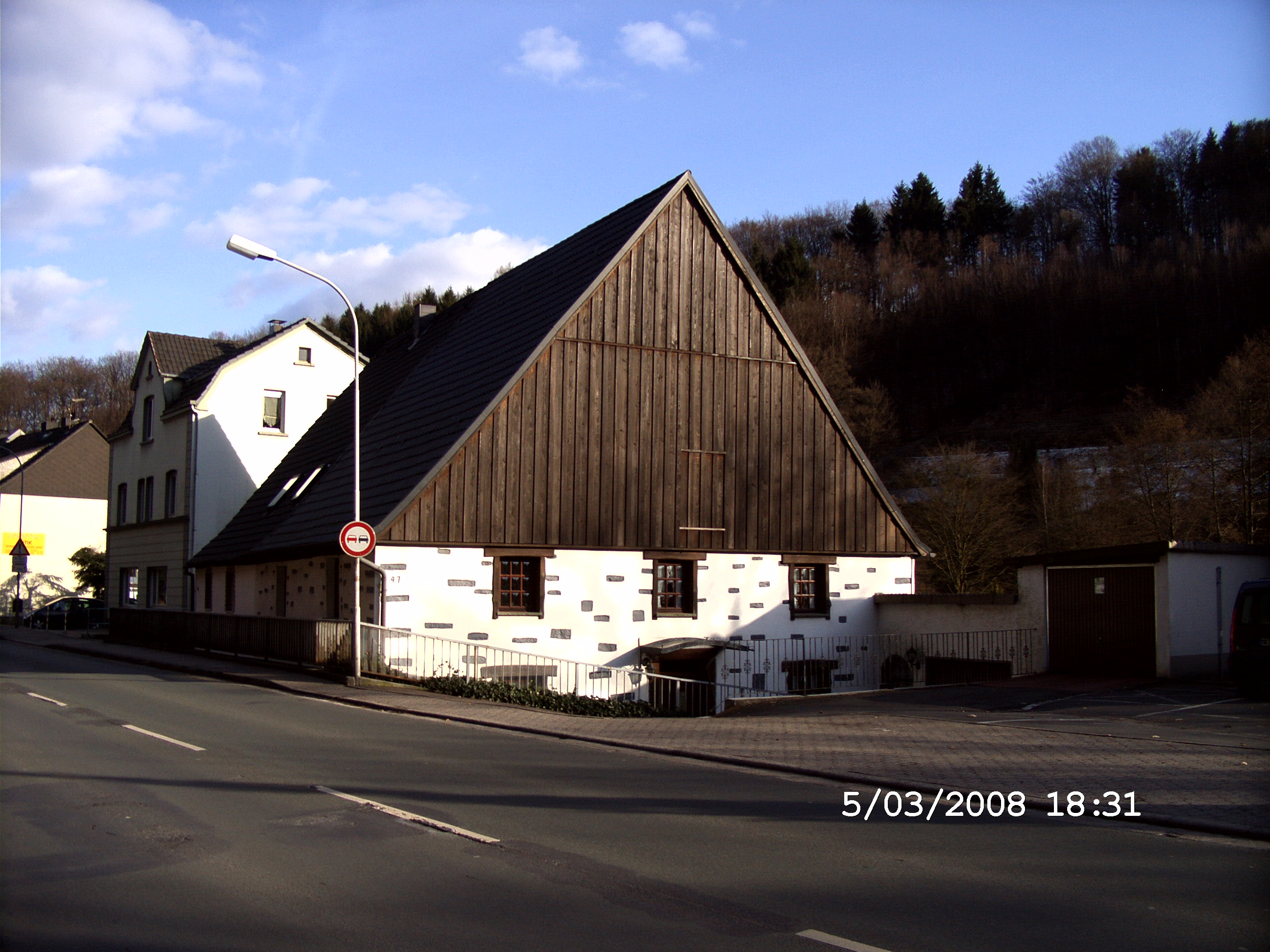 Bauerhaus (Baujahr 1651)